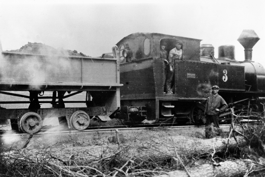 Lokomotive der Abraumbahn der Grube Messel